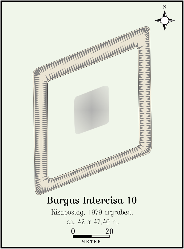 Burgus Intercisa 10, Kisapostag, Ungarn. 1979 ergrabener Wachturm an der Limesstraße zwischen den Kastellen Intercisa und Annamatia. Quelle: Zsolt Visy: „Der pannonische Limes in Ungarn“, Theiss 1988, S. 108 – dort mit einer falschen Nummer!